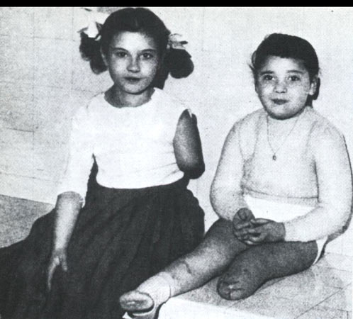 Nicole G 10 ans et Danielle Michel-Chich, 7 ans victimes de l'attentat du Milk bar à Alger, perpétré par le réseau bombe de Yacef Saadi durant la guerre d'Algérie.